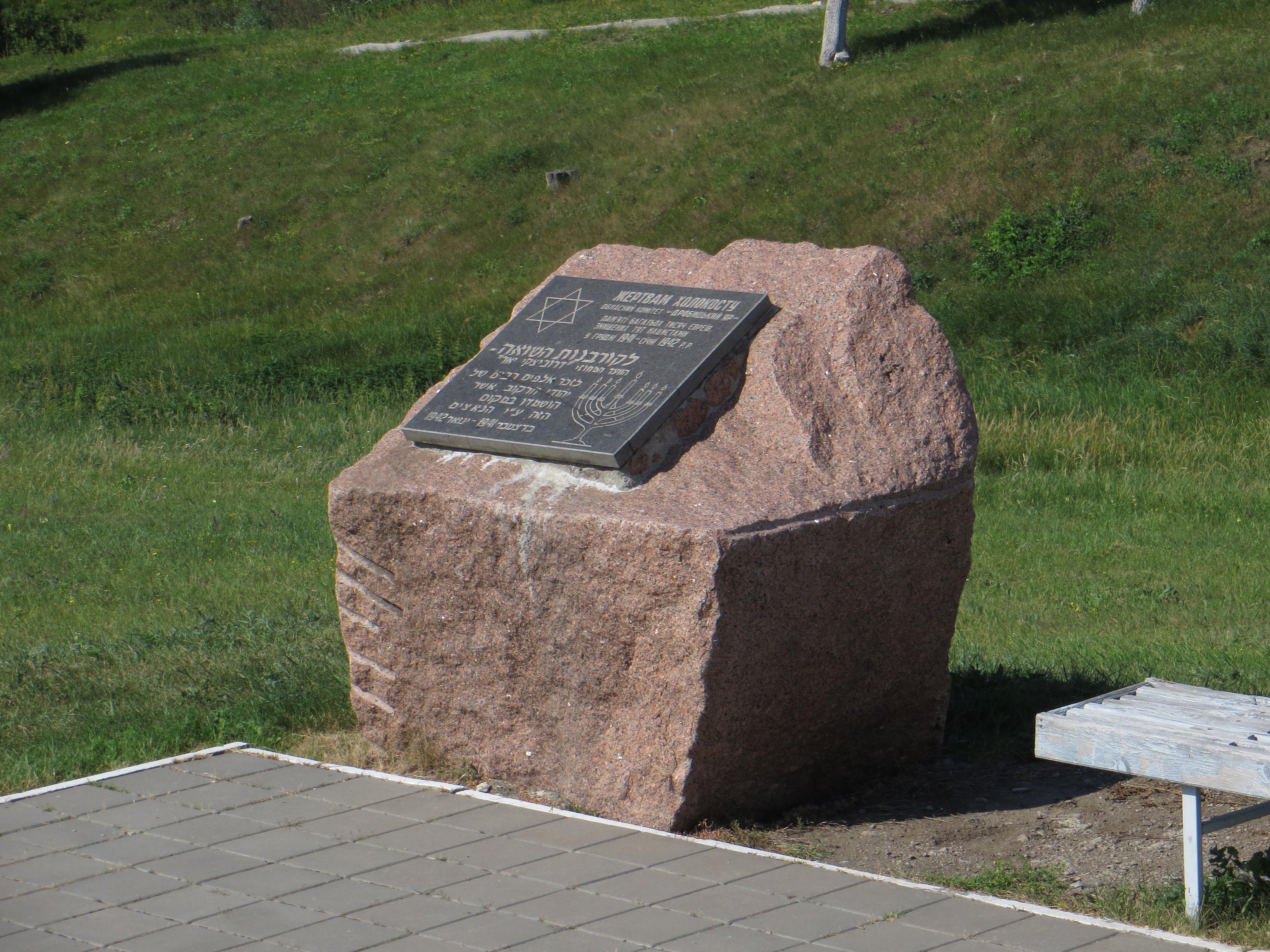 Дробицкий яр, Харьков